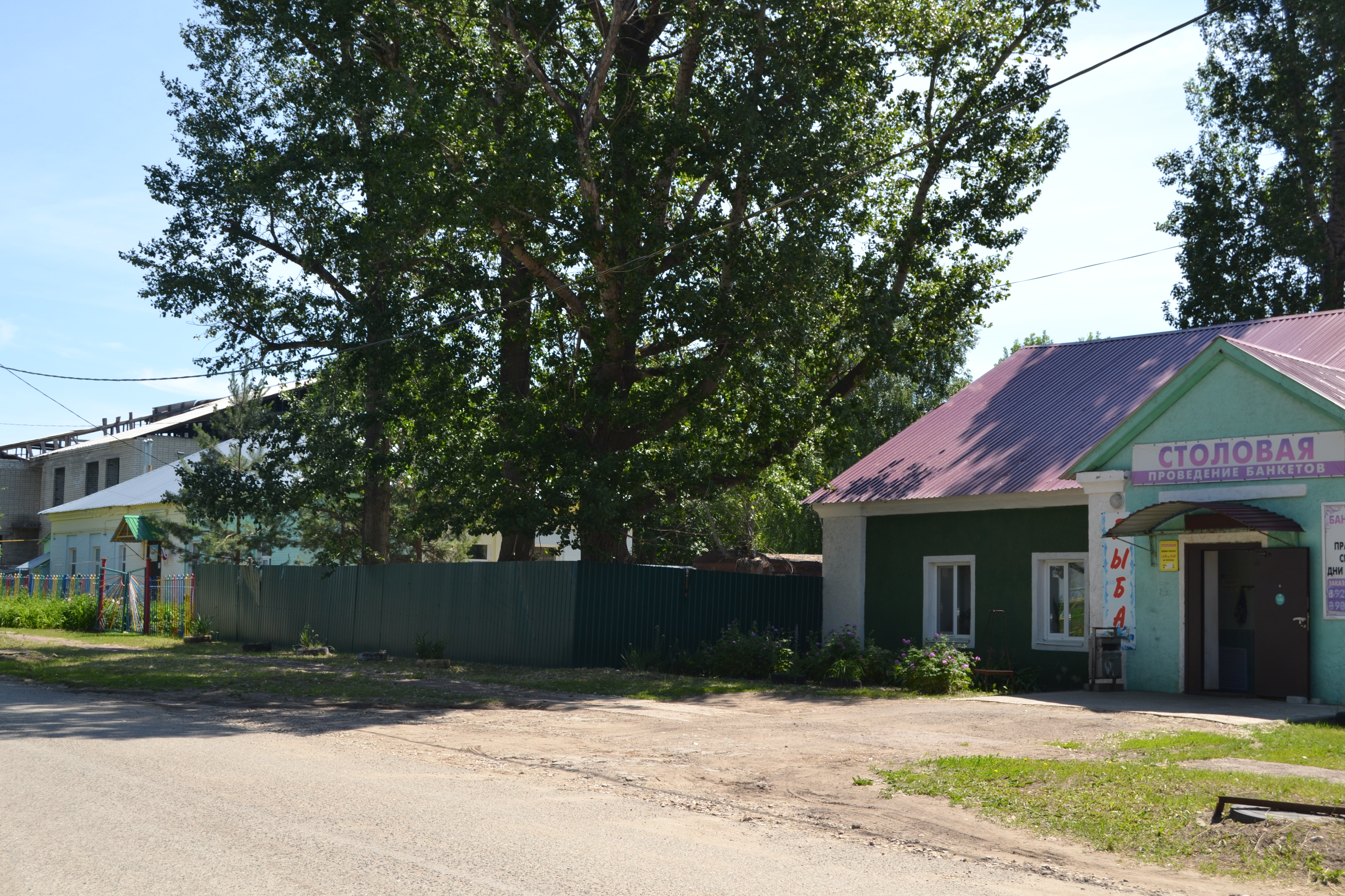 Изображение посёлка. Столовая (Красный Октябрь, Саратовский район)